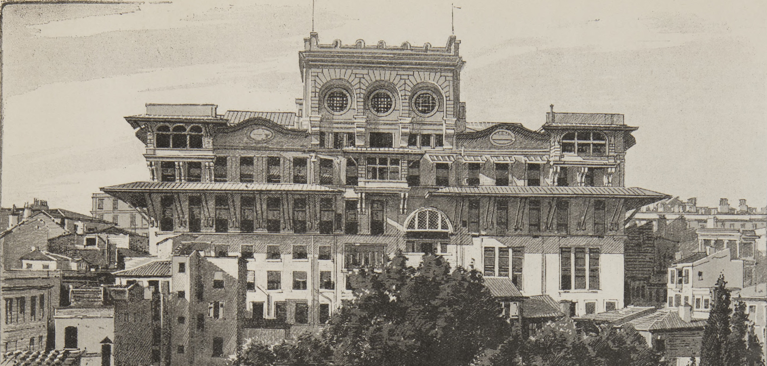 Sede del Banco Otomano en Karaköy, Estambul, (1890-1892). Realizado por el arquitecto Alexandre Vallaury.